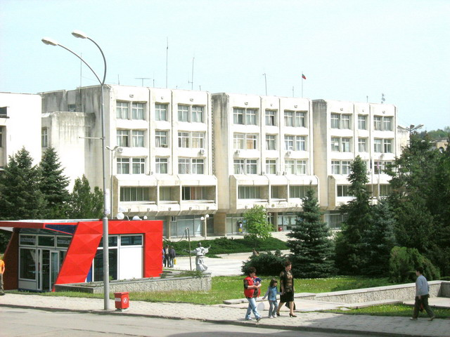 Централният градски площад "Ал. Стамболийски" със сградата на Община Попово - април 2008 год. Фото: Вл. Стойков